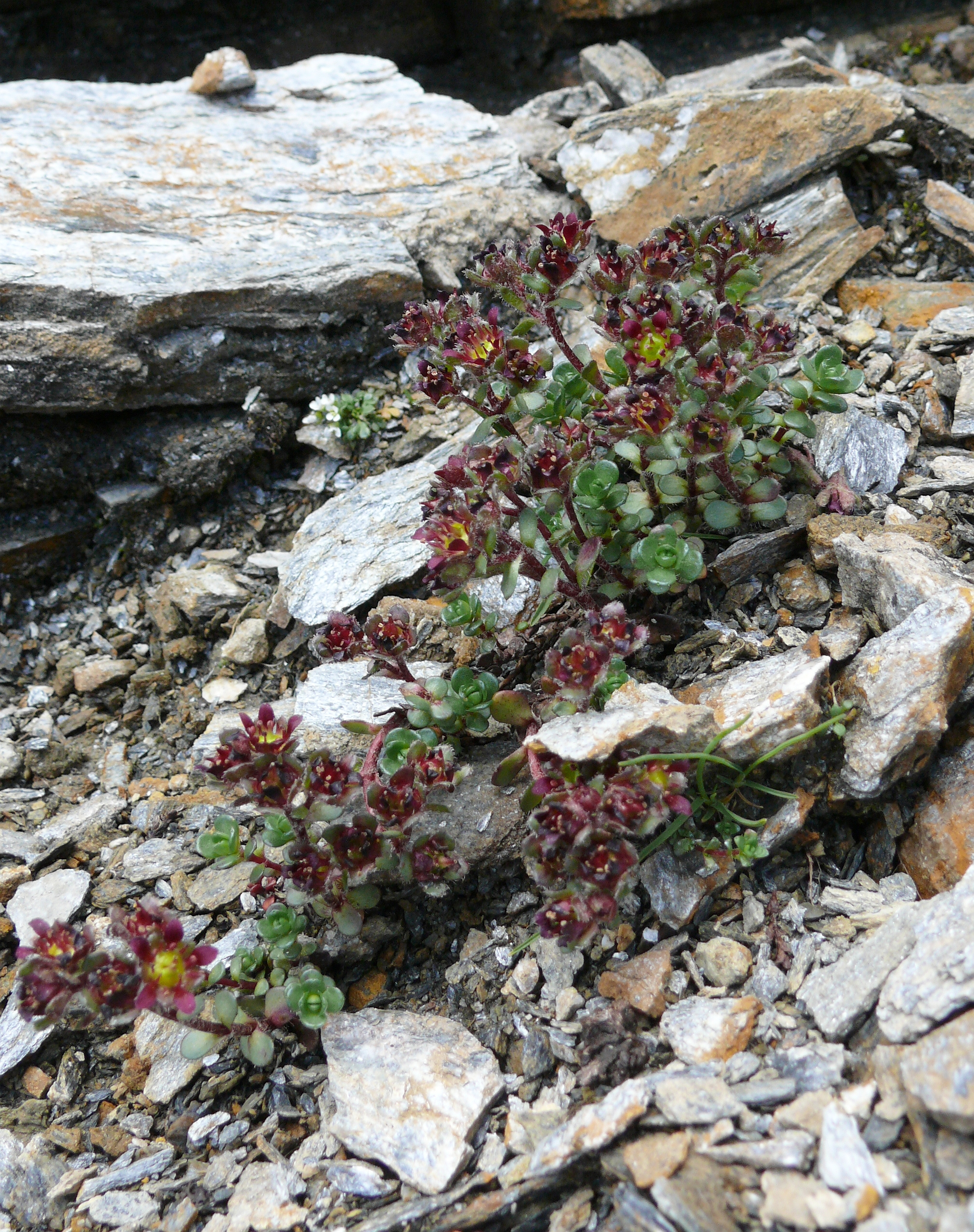 Saxifraga biflora, Zillertaler Alpen, Italy